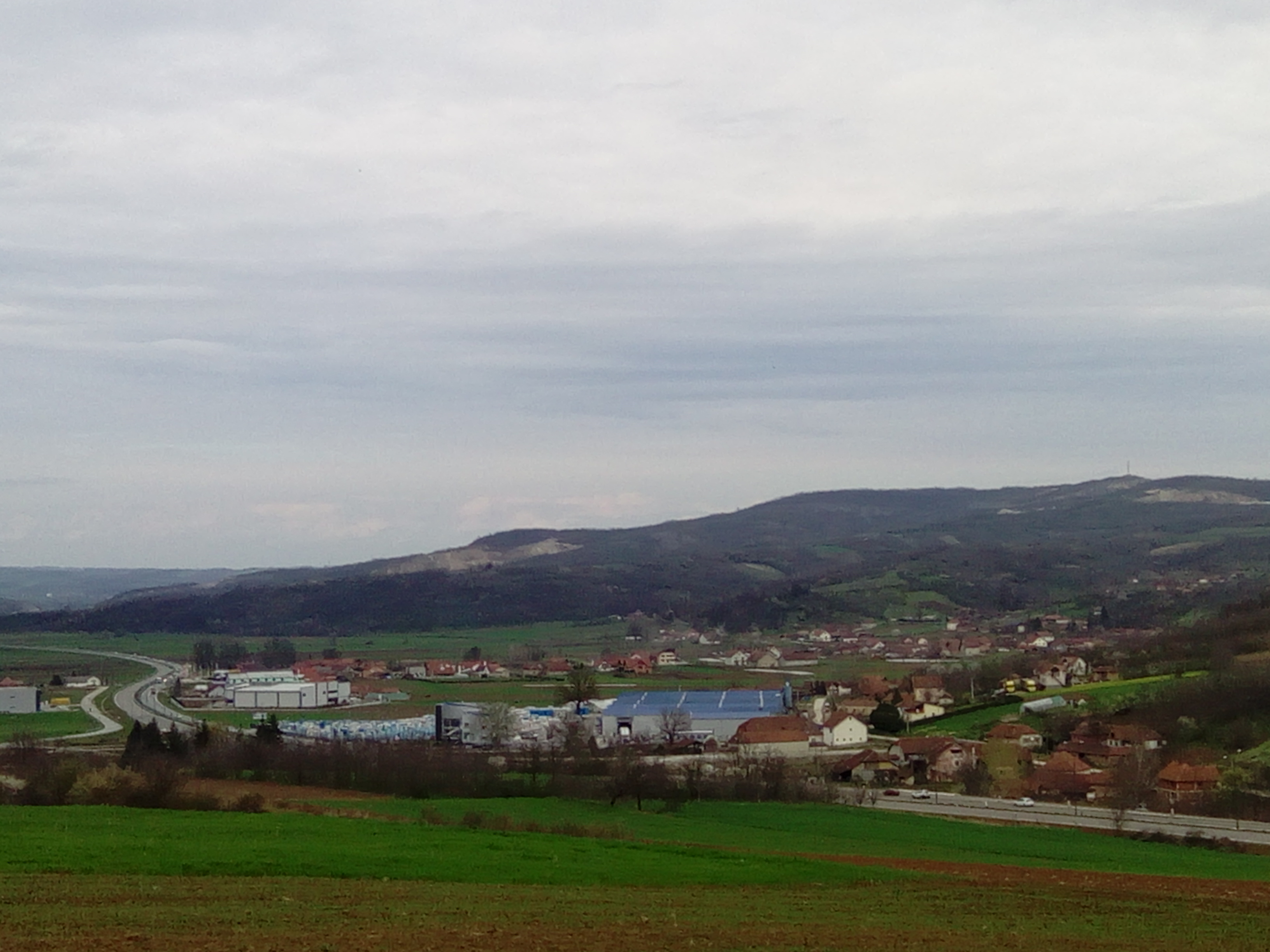 Srpski (latinica): Pogled na Žirovnicu